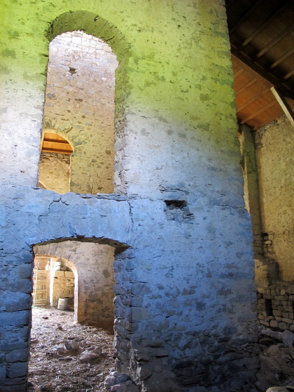 fortalesa La Sala a Vilallonga de Ter a la Comarca del Ripollès - Catalunya